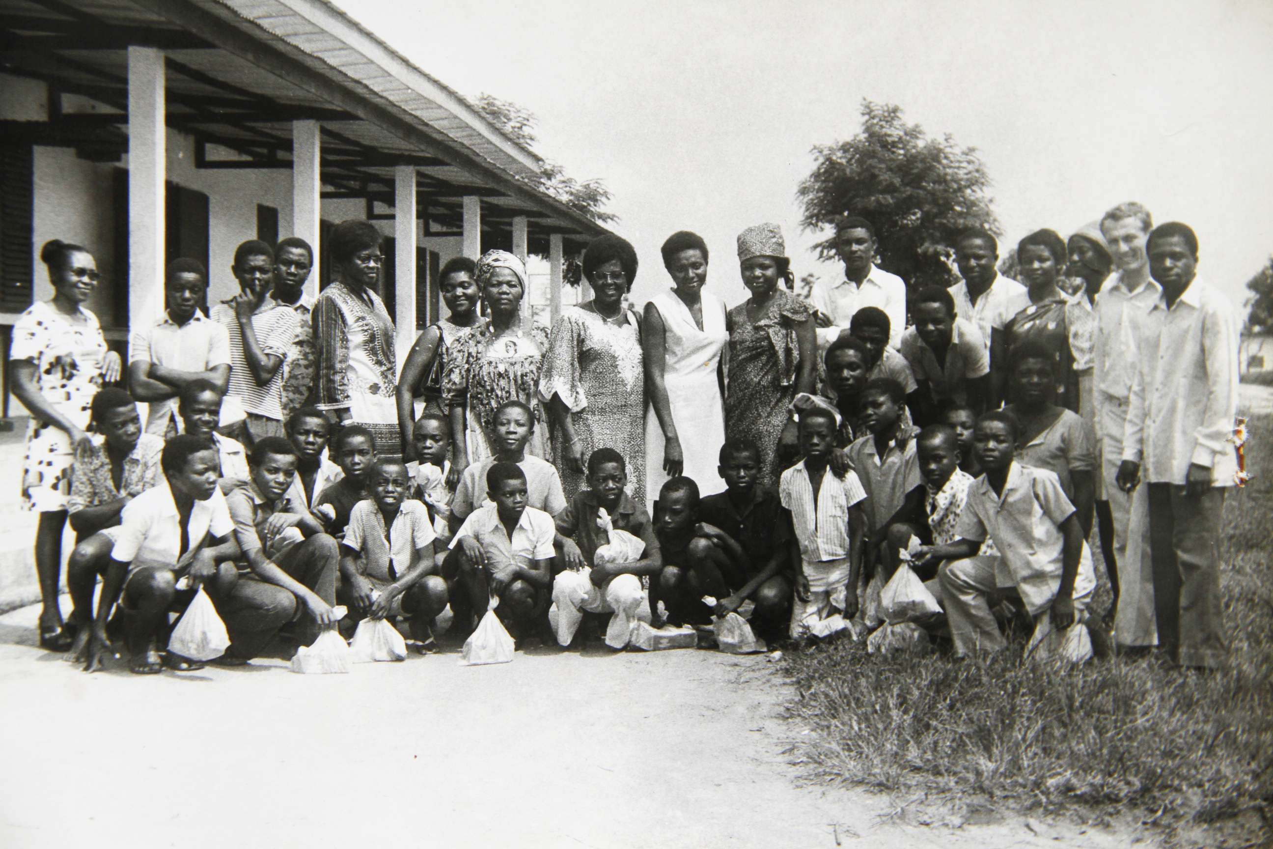 Mme Ebanda, députée, remettant les cadeaux au centre d'accueil des enfants de Bépanda à Douala